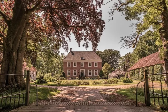 Havezate Herinckhave te Fleringen